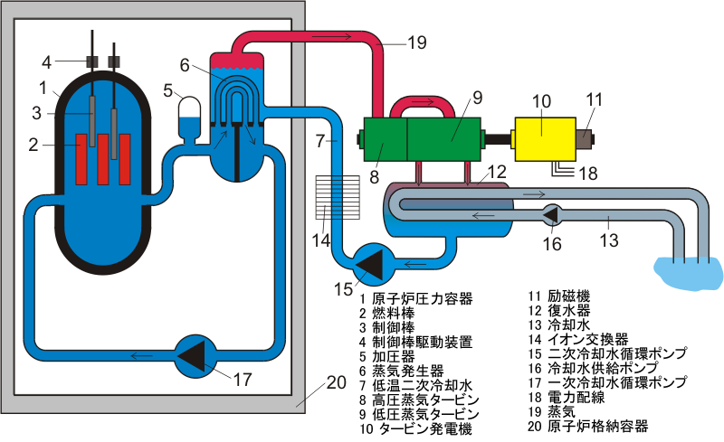 加圧水型原子炉 原図を元に、制御棒を上から下ろす図に変更 原図：